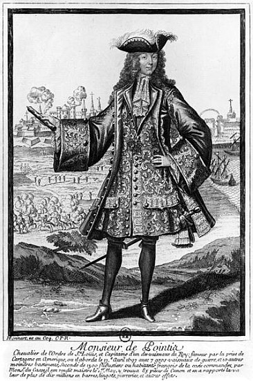 Portrait (gravure) de Jean Bernard de Pointis (1645-1707), chef d'escadre de la Marine royale française